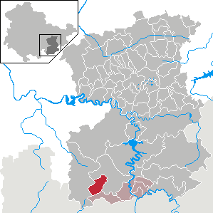 Neundorf (bei Lobenstein) in Thuringia - Saale-Orla-Kreis